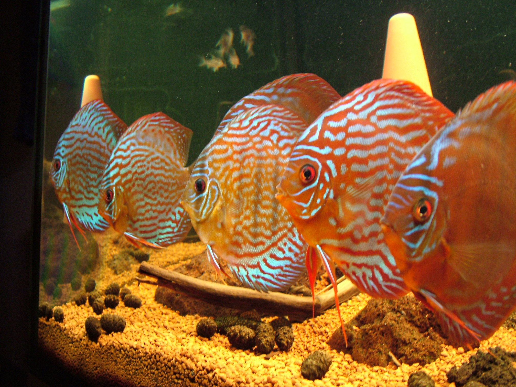 Ein Diskusfisch (lat. Symphysodon aequifasciata, Zuchtform)